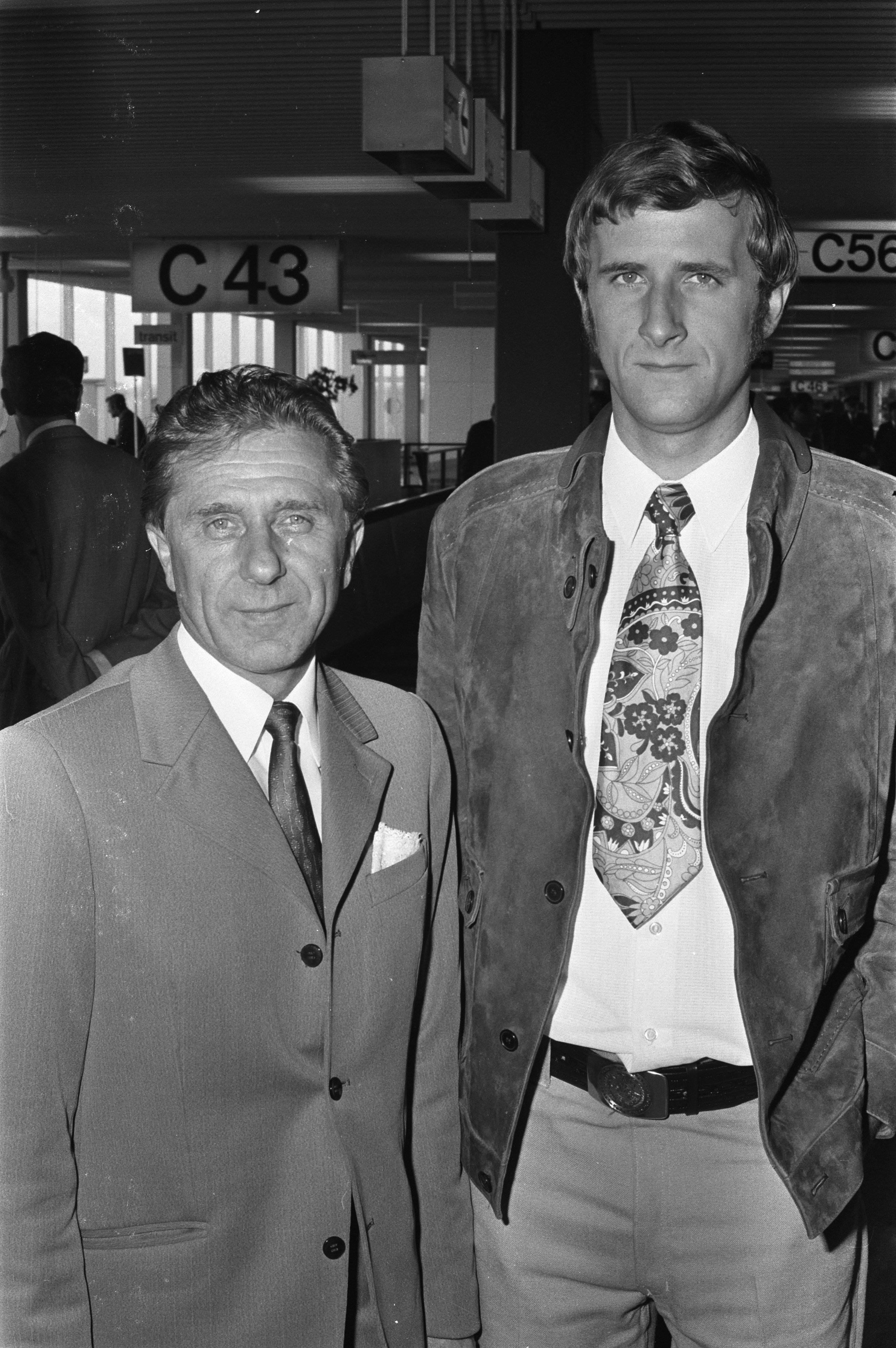 Collectie / Archief : Fotocollectie Anefo Reportage / Serie : [ onbekend ] Beschrijving : Elftal Dynamo Dresden arriveert op Schiphol, links Fritzsch (Walter), rechts Kreische Datum : 13 september 1971 Trefwoorden : elftallen, sport, voetbal Persoonsnaam : Dynamo Dresden, WALTER Fotograaf : Verhoeff, Bert / Anefo Auteursrechthebbende : Nationaal Archief Materiaalsoort : Negatief (zwart/wit) Nummer archiefinventaris : bekijk toegang 2.24.01.05 Bestanddeelnummer : 924-9291